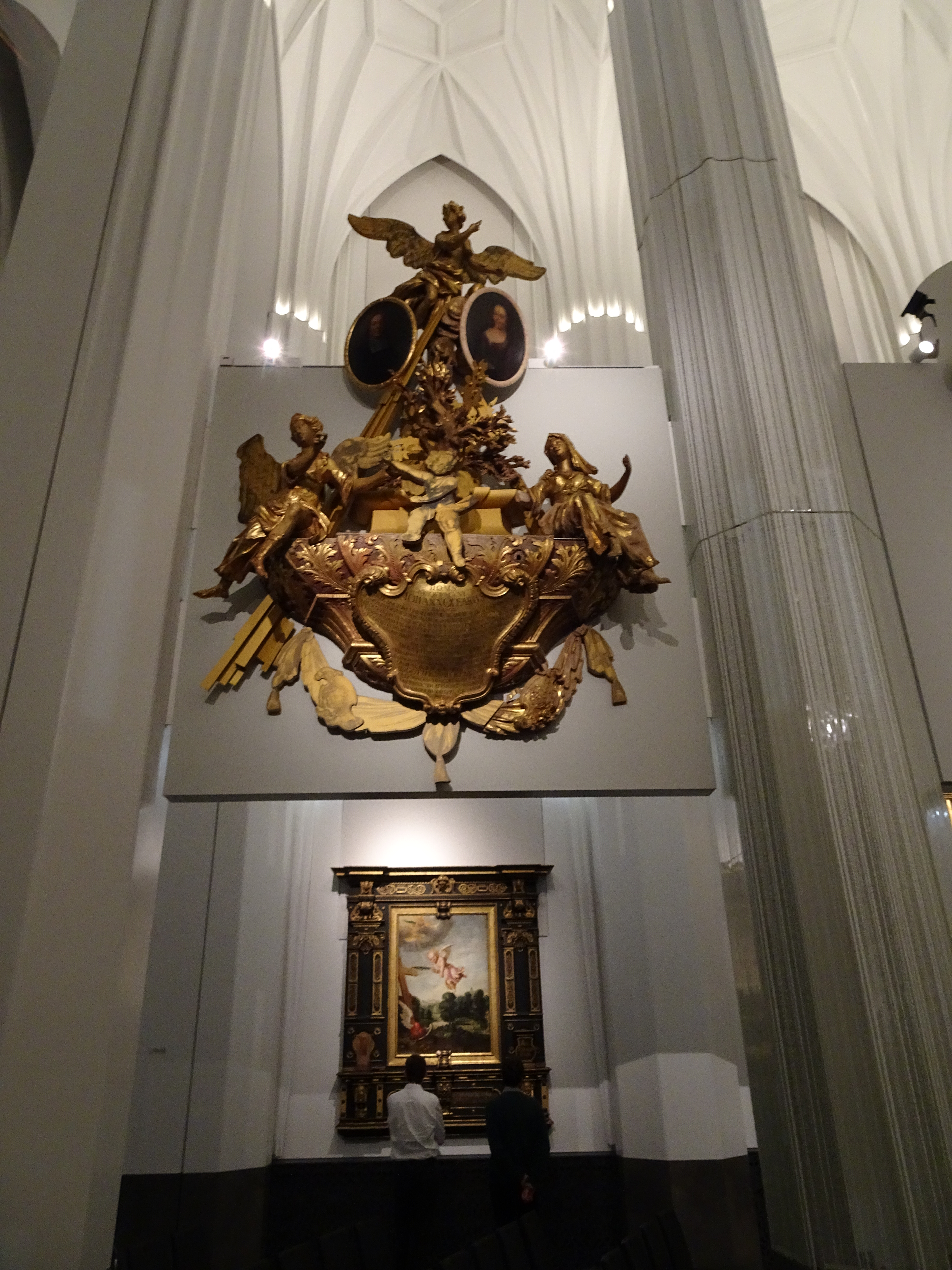 Epitaph für den Theologen Johannes Olearius und seine Ehefrau Anna Elisabeth, geb. Müller in der Leipziger Universitätskirche